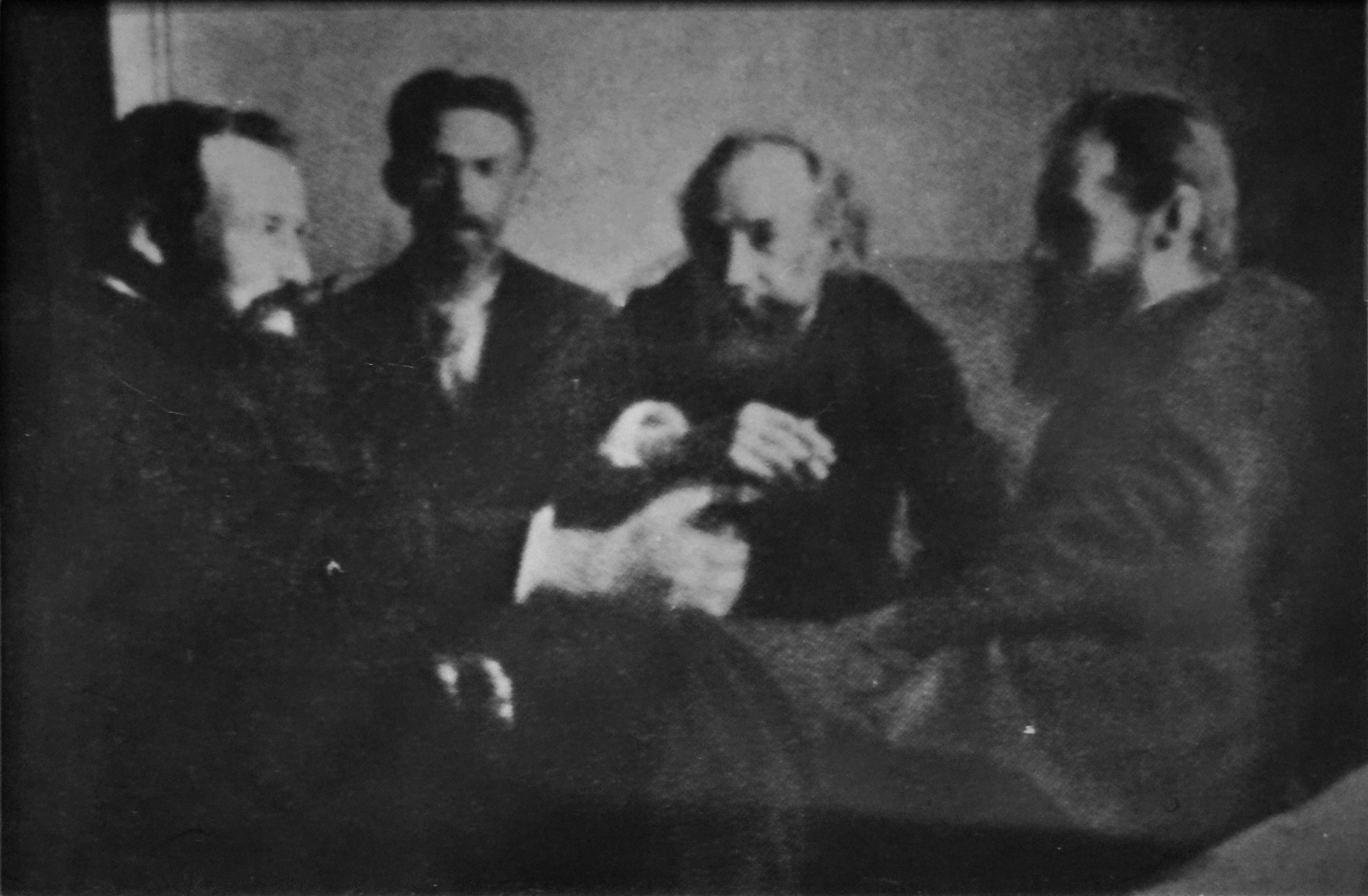 Самарский художник Ф.Е.Буров (слева) среди прочих самарских художников